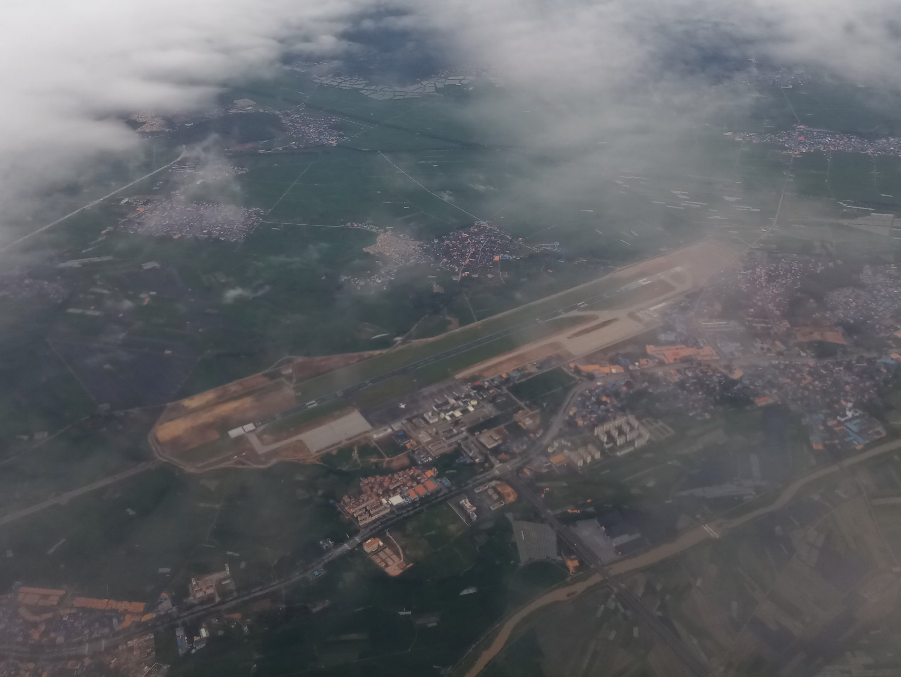 中文（中国大陆）: 德宏芒市机场-俯瞰